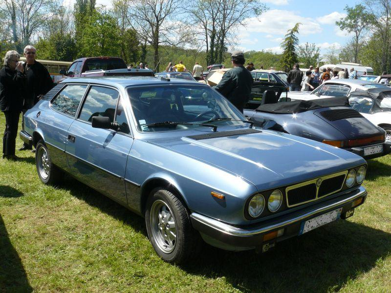 Photo prise le premier mai 2012 à Chelles.